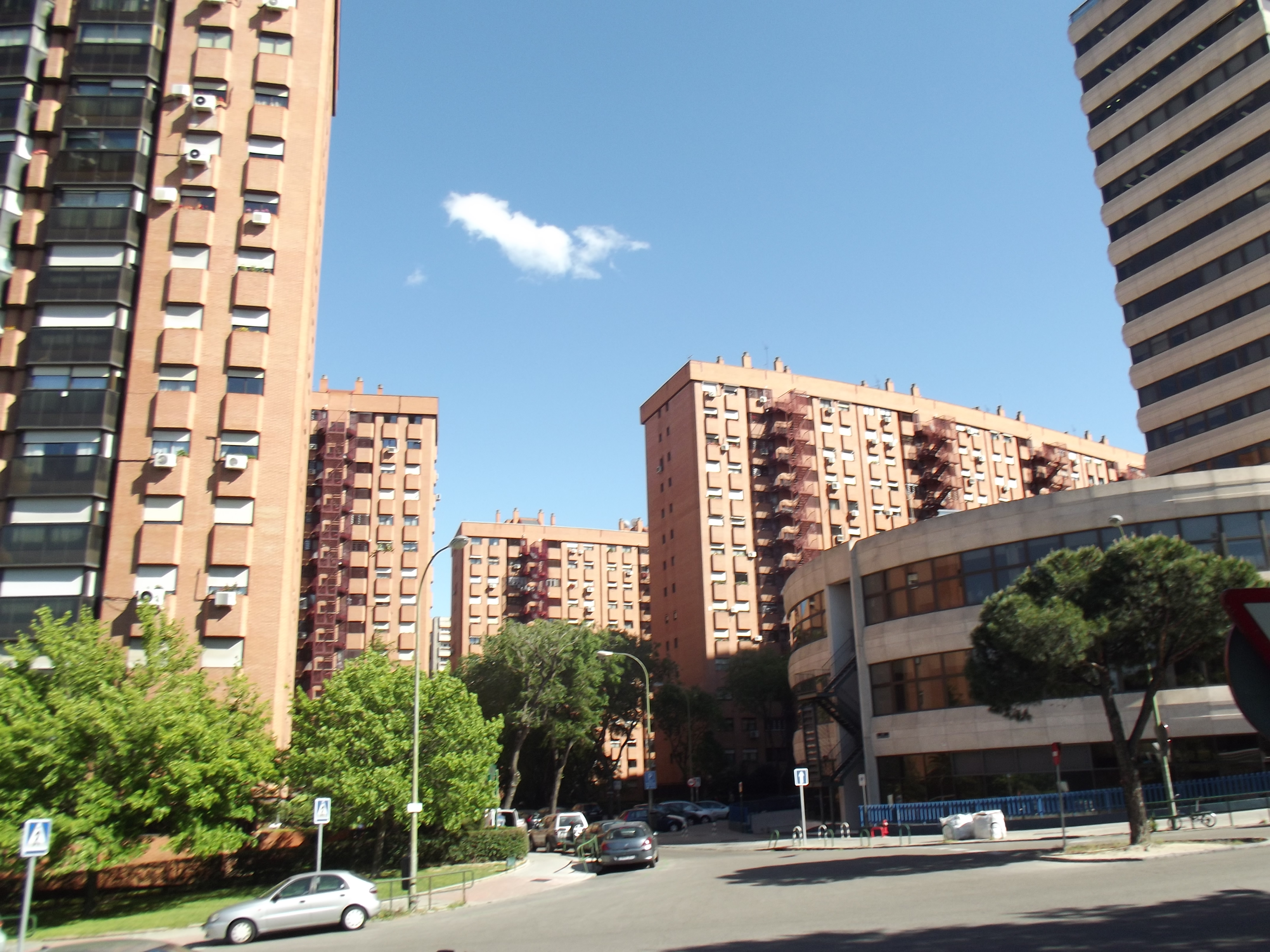 Edificios en el barrio de Estrella, Madrid.